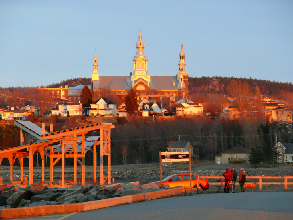 Ville de Trois-Pistoles vue du quai. (Bas-Saint-Laurent)